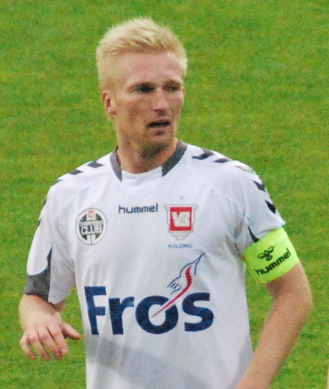 Fodboldspilleren Steffen Kielstrup fra Vejle-Kolding. Her i 1. divisionskampen imellem Viborg FF og Vejle-Kolding på Viborg Stadion.